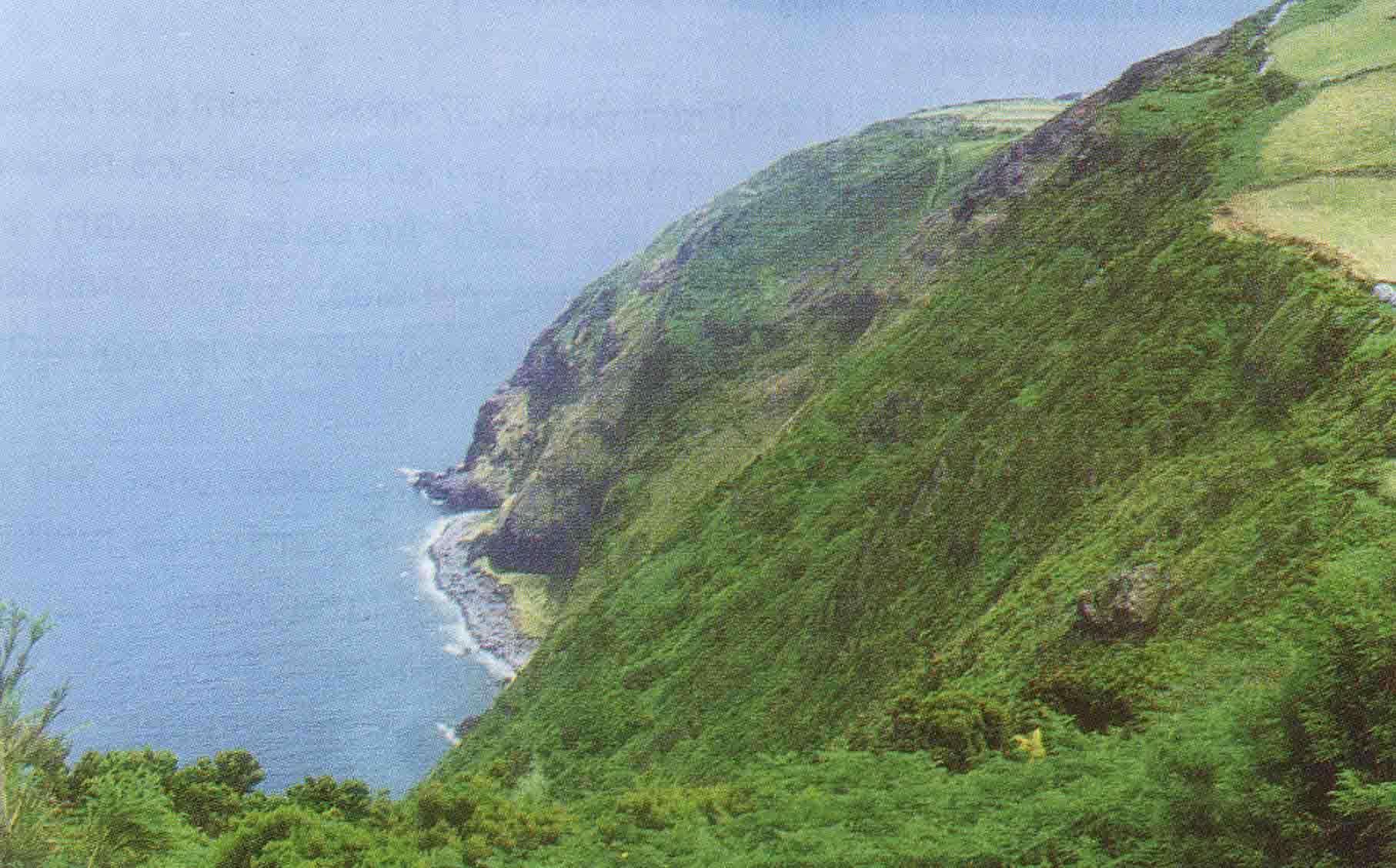 Fajã das Cubas ou da Baleia, ilha de São Jorge, Açores, Portugal.